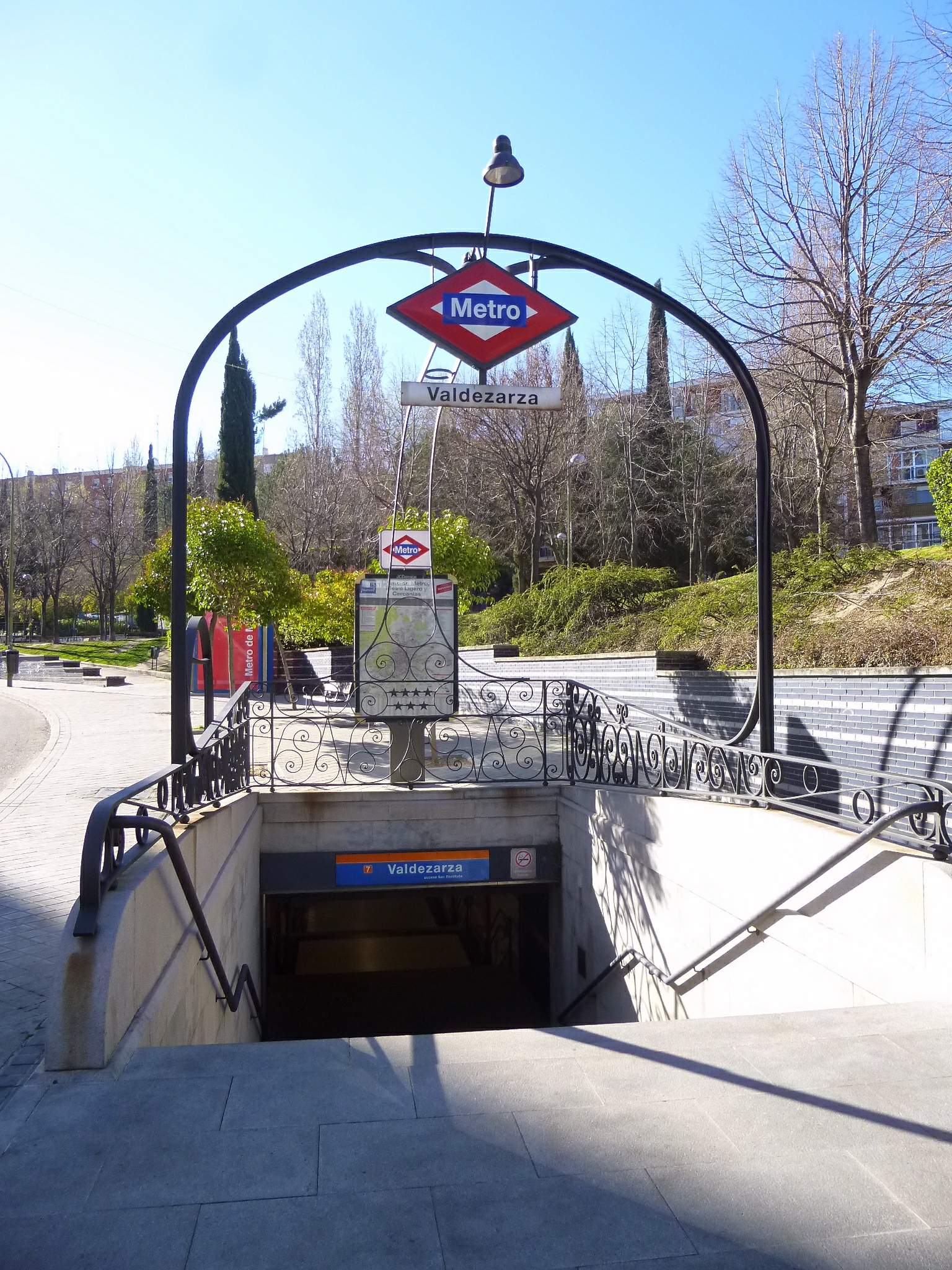 Madrid - Estación de Valdezarza (L-7 de Metro de Madrid)